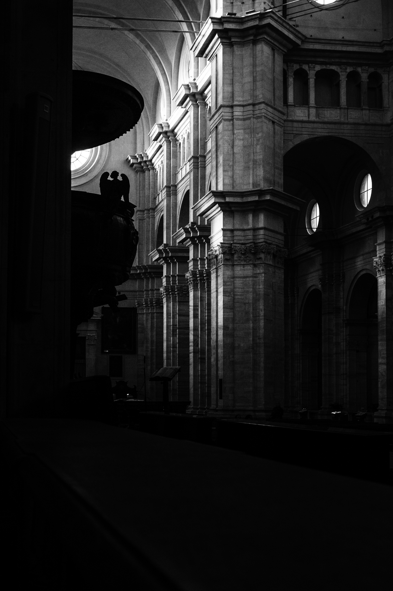 Particolare del interno del Duomo di Pavia